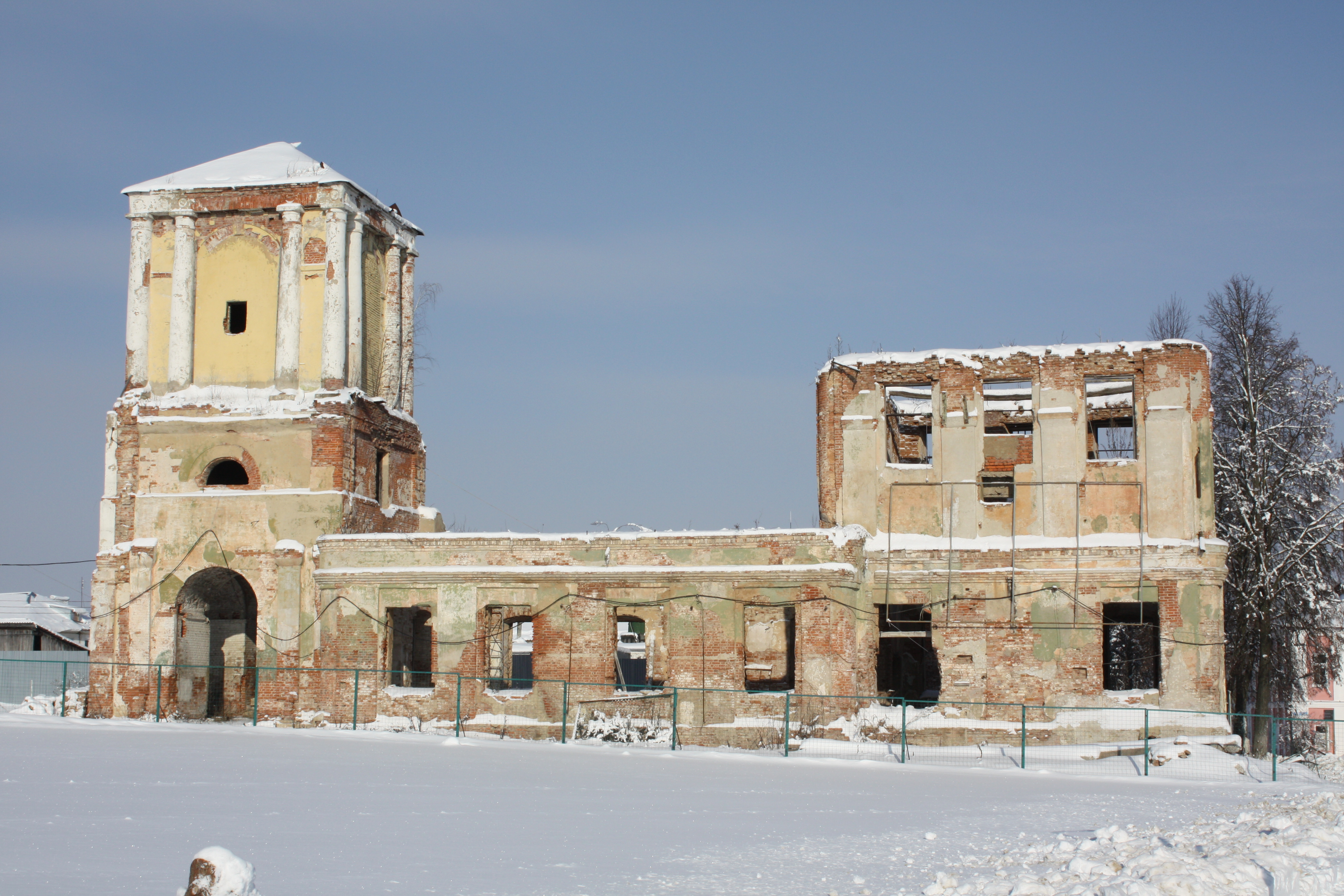 Нынешнее состояние, здания пристроенных цехов консервного завода снесены